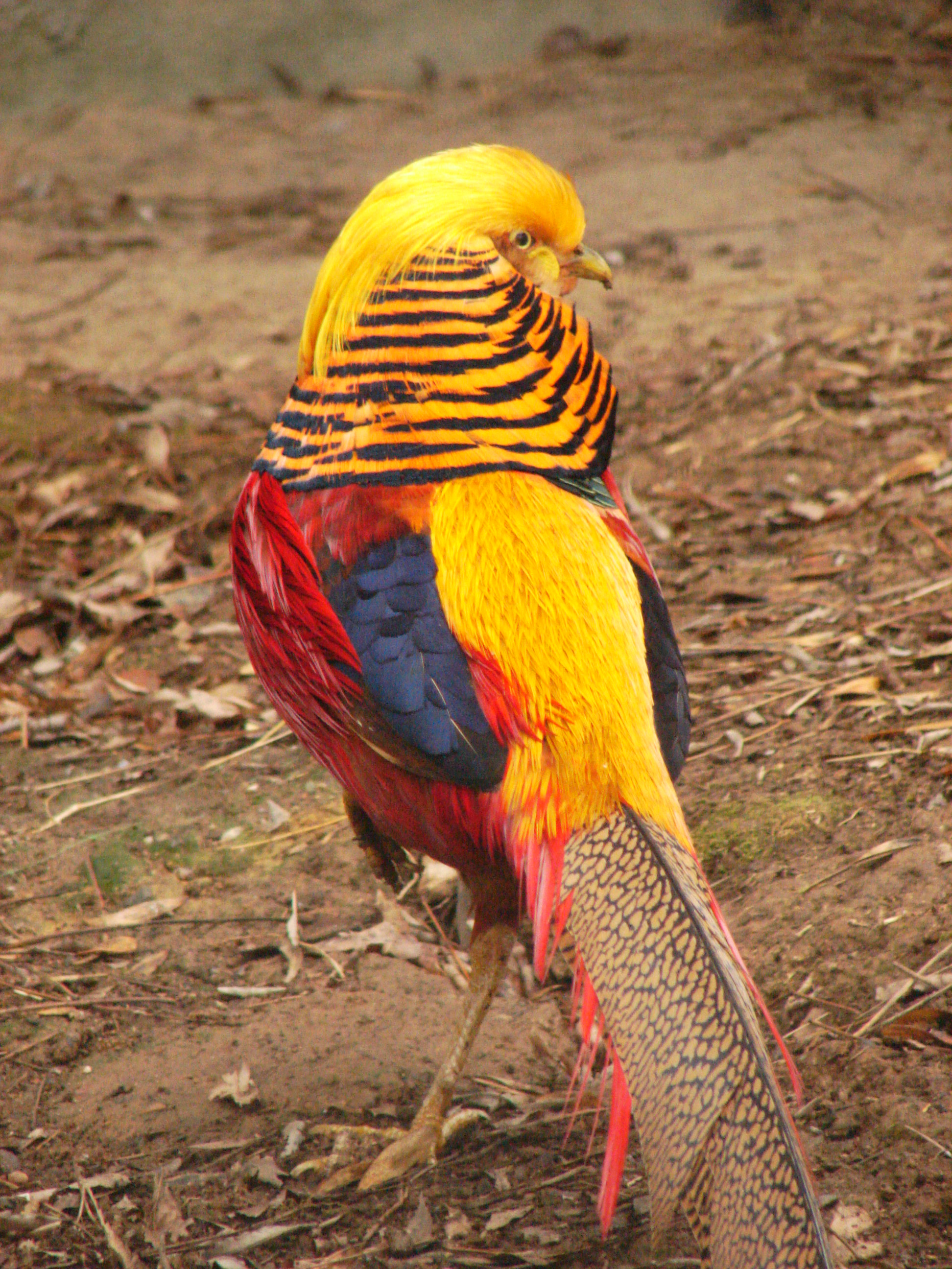 Bogazici Zoo